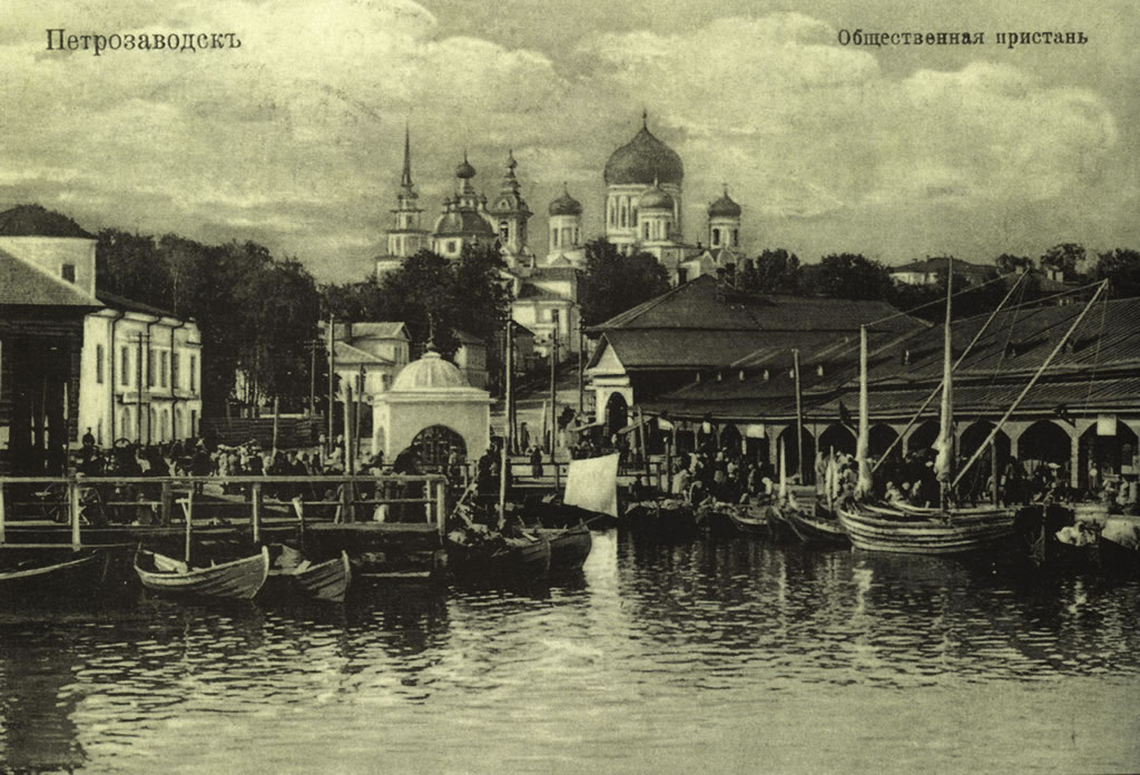 Пристань в Петрозаводске